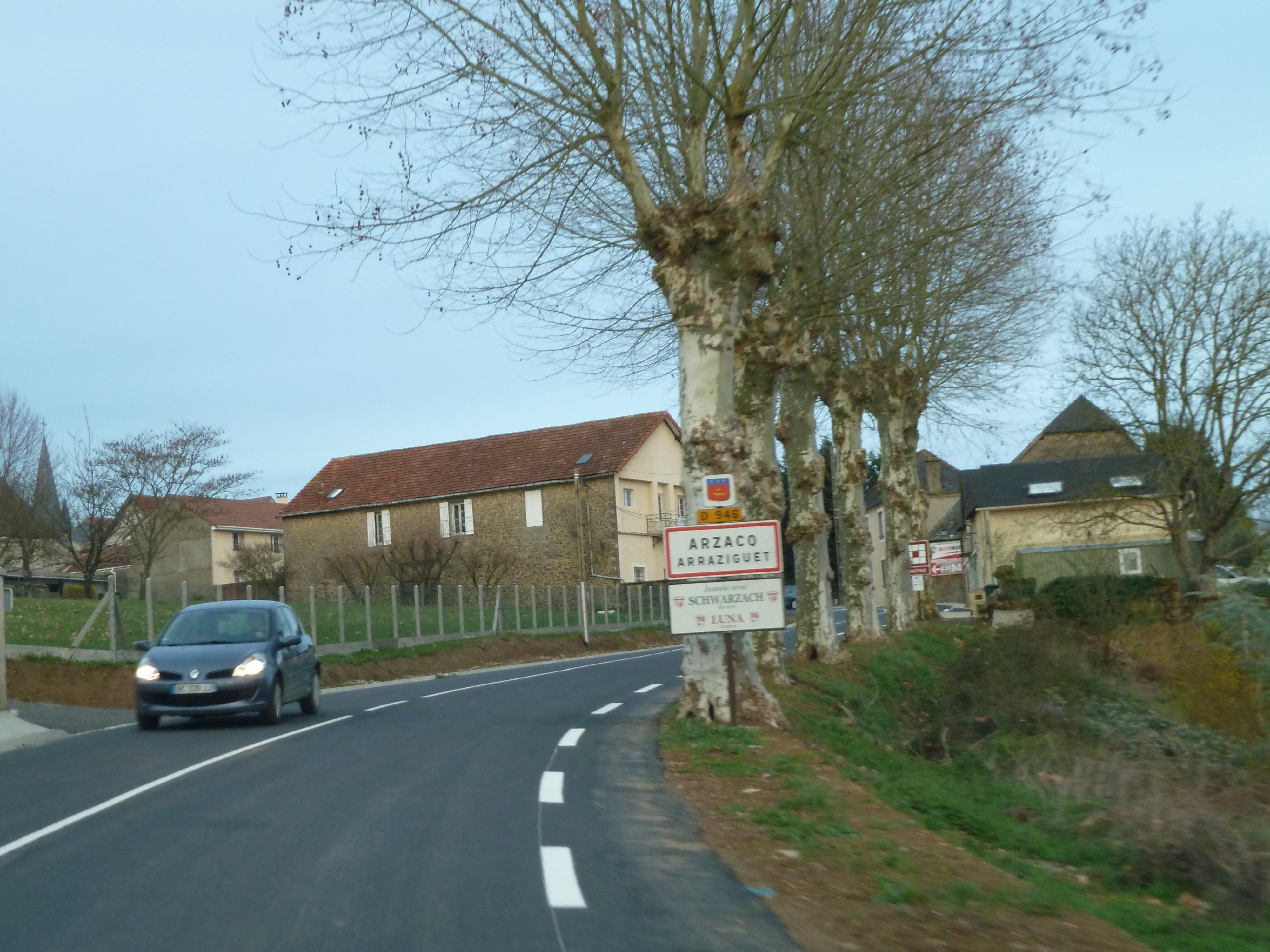 Entrée dans Arzacq-Arraziguet